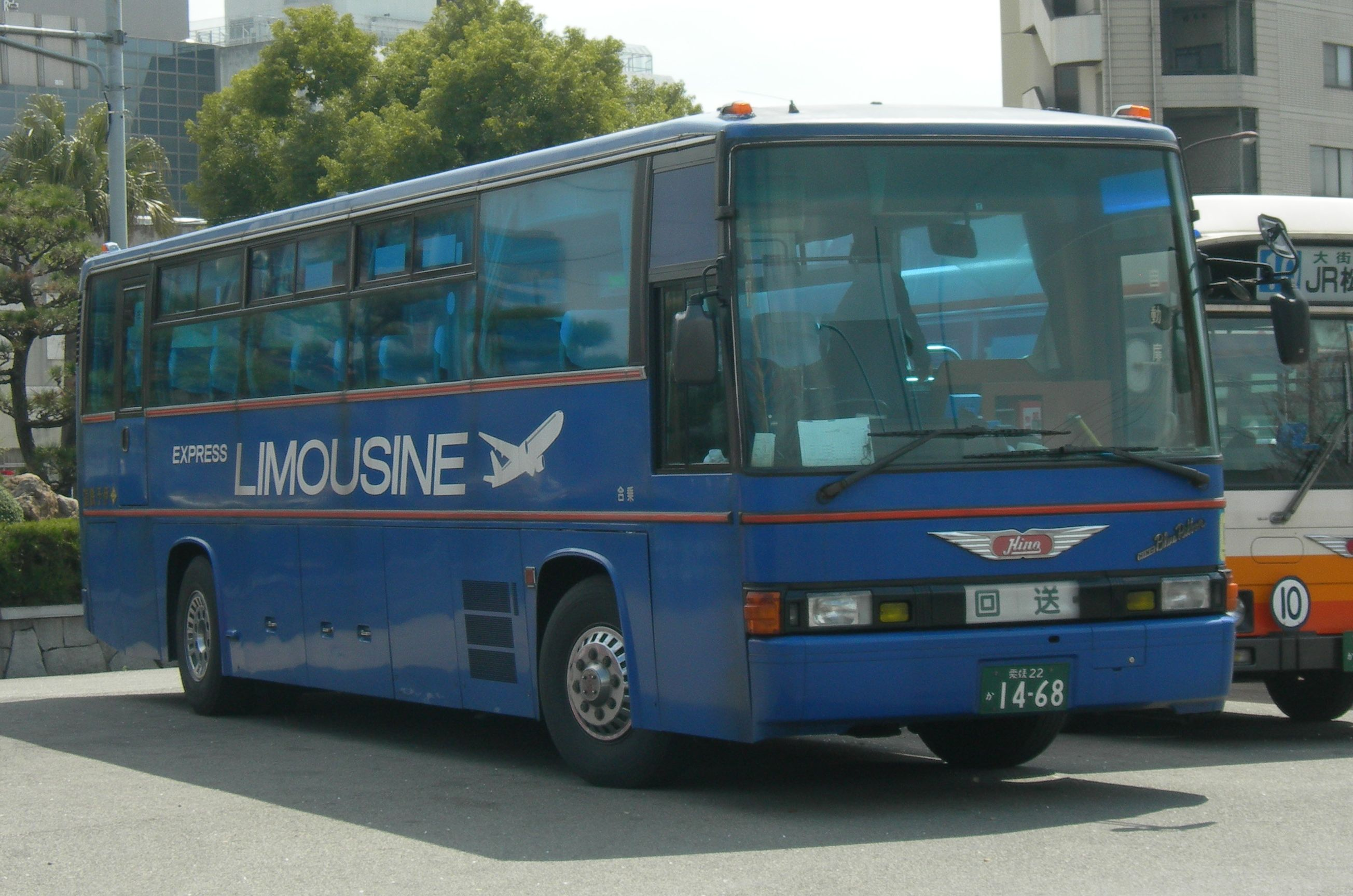 伊予鉄道 リムジンバス用の車両